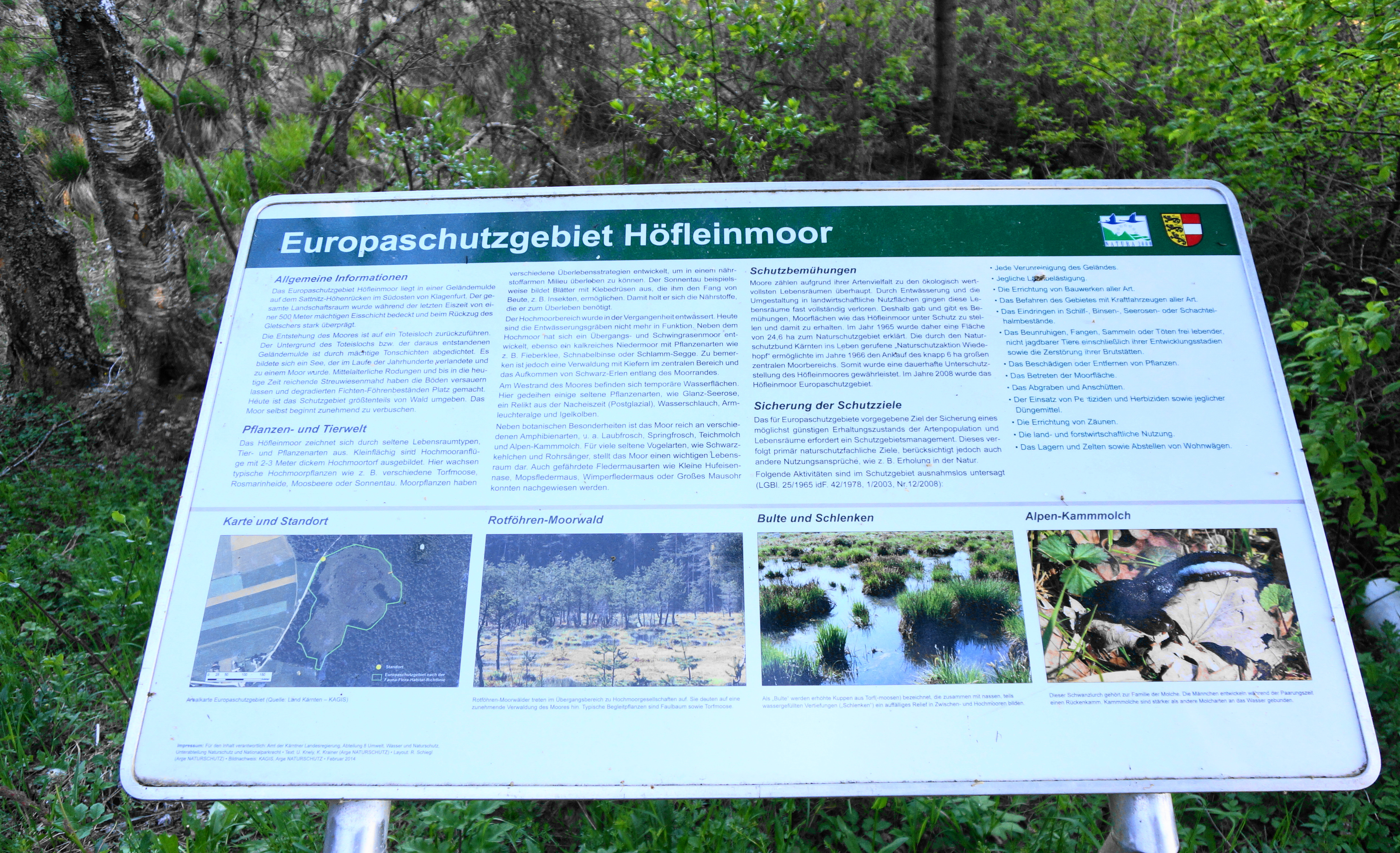 Höflein-Moor, Naturschutzgebiet in Kärnten This media shows the nature reserve in Carinthia with the ID NSG.011.